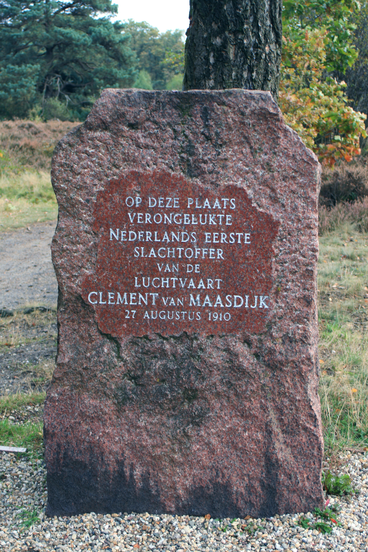 Locatie waar Nederlands eerste slachtoffer van de luchtvaart -Clement van Maasdijk- is verongelukt.